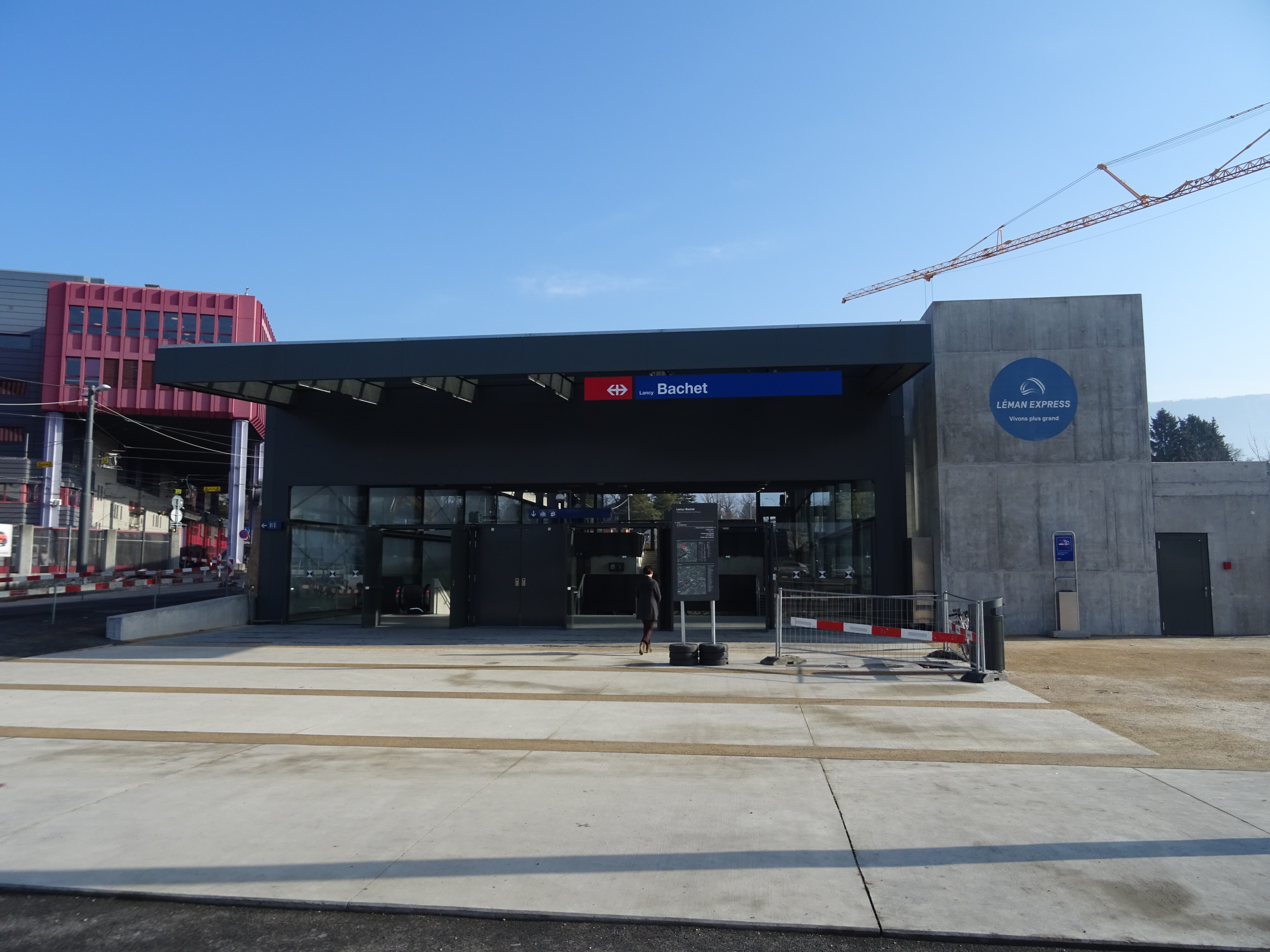 Bâtiment voyageurs de la gare de Lancy-Bachet.